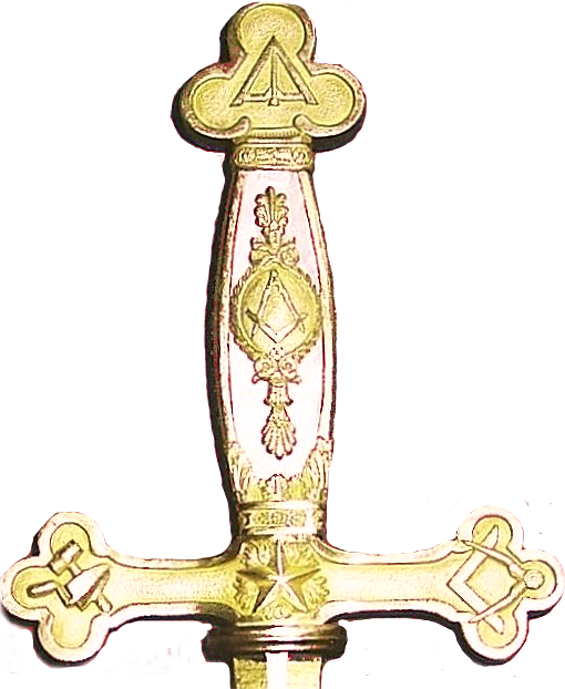 Garde de l'épée maçonnique de Lafayette. L'objet original se trouve au musée de la Franc-maçonnerie, à Paris et date des environs de 1820. Une notice muséologique et une photographie de l'objet original sont consultables sur le site web de ce musée (